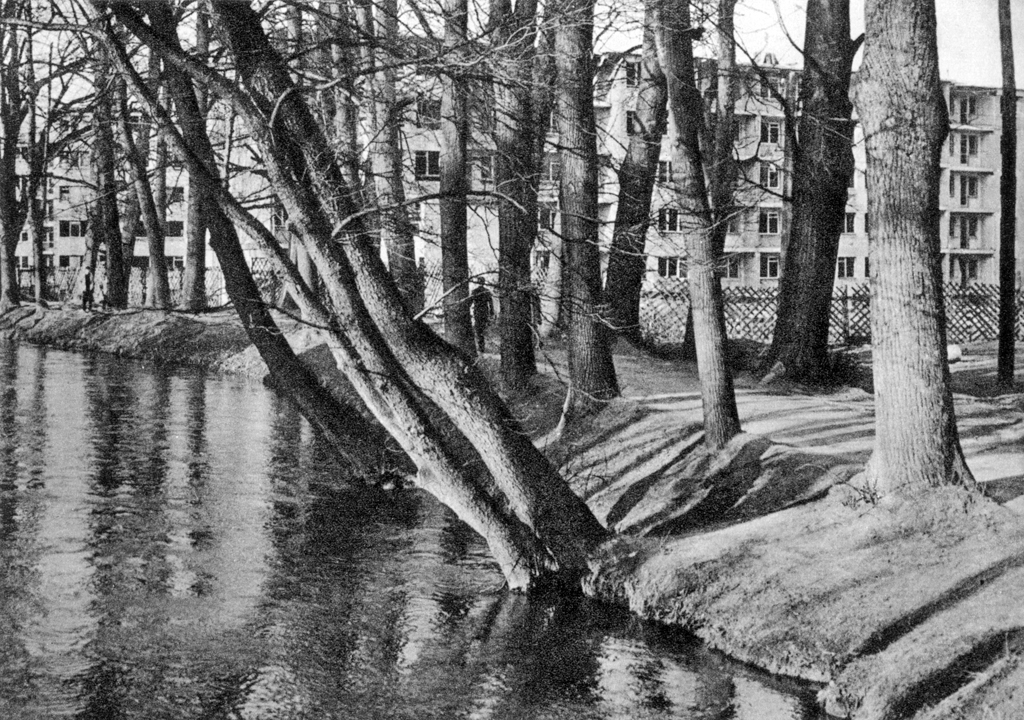 Osiedle Nysa w Kłodzku